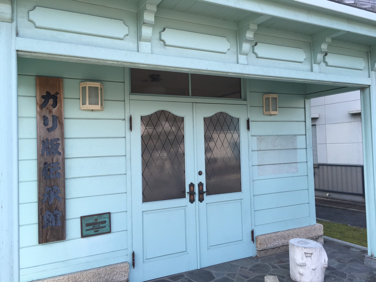 ガリ版伝承館